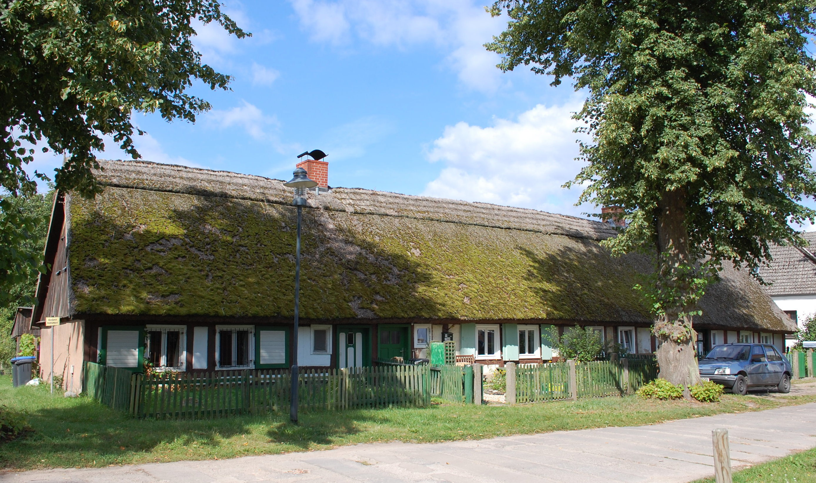 Häuser in der Ortsmitte von Annenwalde